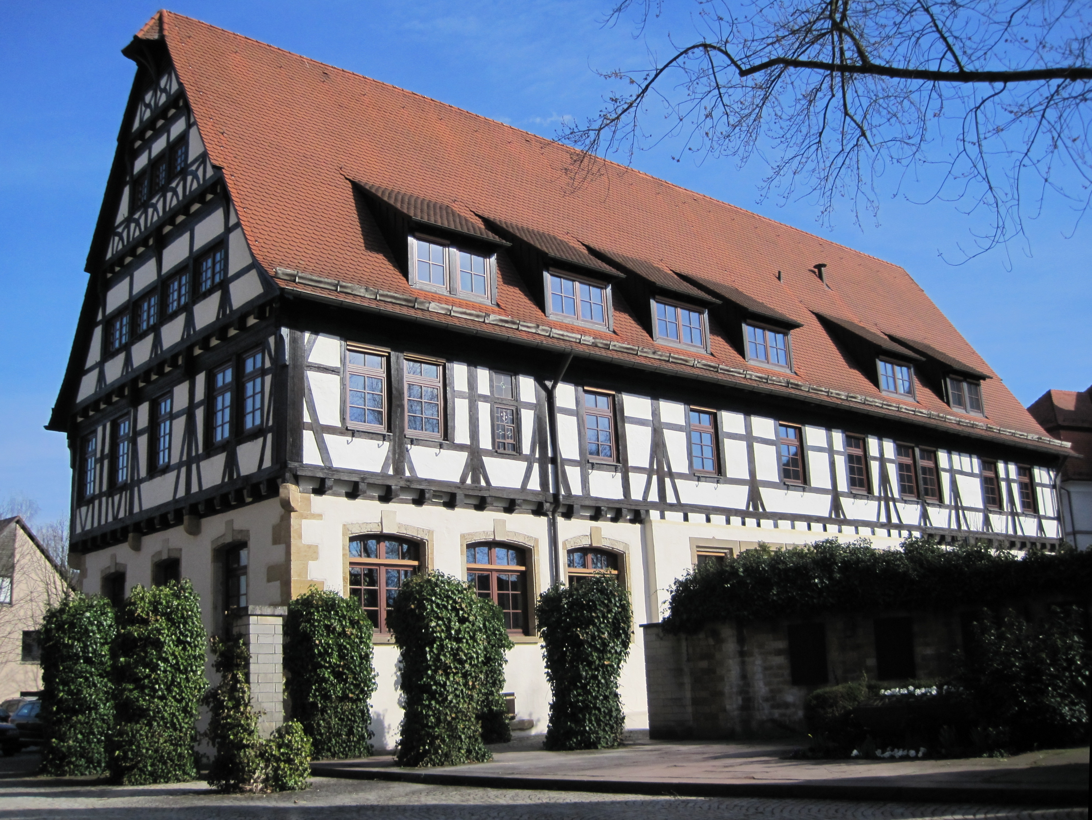 Das Schlössle in Dettingen an der Erms. Erbaut 1502 bis 1504 unter Herzog Ulrich. Es dient heute als Rathaus.